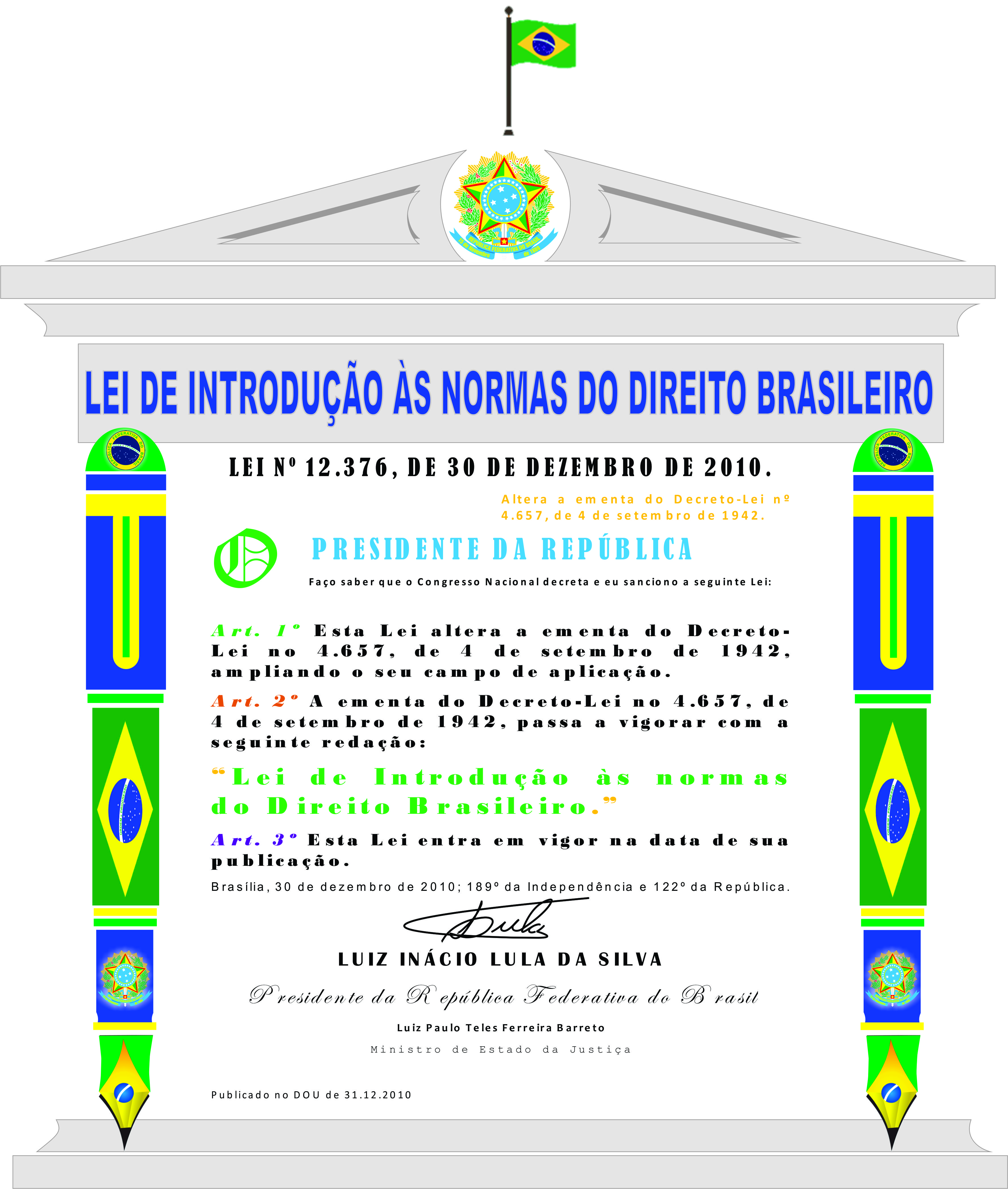 Pórtico brasílico com a literatura da lei 12.376, de 30 de dezembro de , que altera o Decreto-Lei nº 4.657, de 4 de setembro de 1942 que passou a denominar-se LEI DE INTRODUÇÃO ÀS NORMAS DO DIREITO BRASILEIRO".